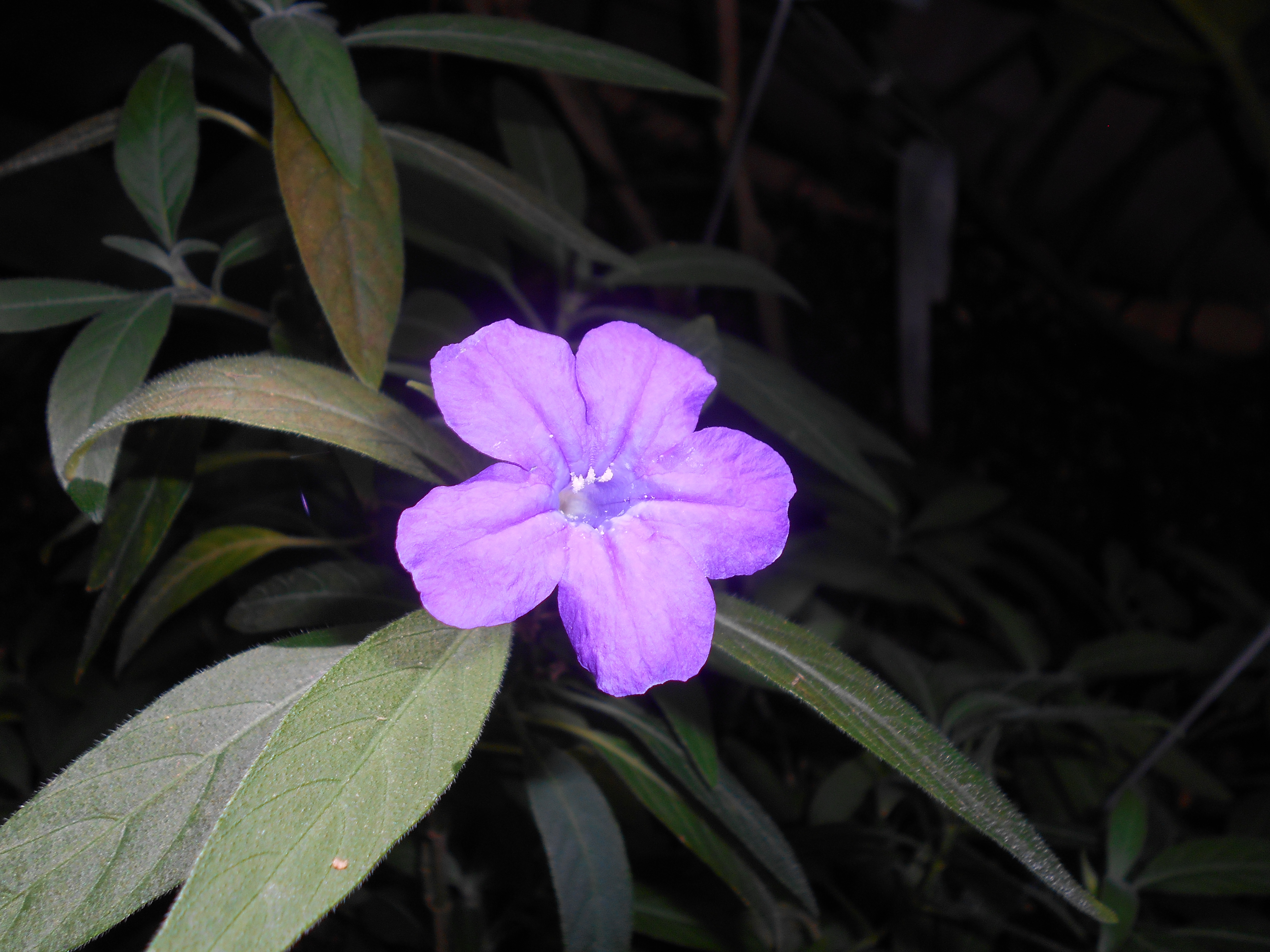 Ruellia squarrosa, Botanischer Garten Berlin.